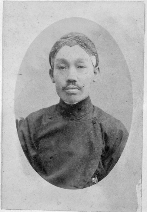 Foto. Studioportret van Raden Adipati Sosrodiningrat IV, rijksbestuurder van Soerakarta (Solo)